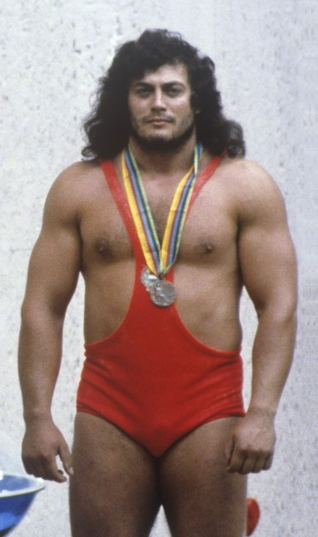 György Szalai at the 1980 Olympics